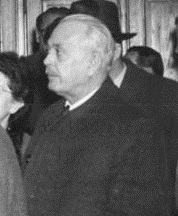 Zentralbild-Junge Hlg-Wi 5.4.1954 IV. Parteitag der sozialistischen Einheitspartei Deutschlands,Berlin, Werner-Seelenbinder-Halle Am 5.4.1954 besuchten die ungarischen Genossen, die als Gäste auf den IV.Parteitag der sozialistischen Eiheitspartei Deutschlands weilen, den VEB Drehmaschinenwerk "7. Oktober". UBz Im technischen Kabinett des VEB "7.Oktober" zeigt der Stellvertreter des Sekretärs der Betriebsparteiorganisation Heinz Dietrich dem Mitglied des Politbüros und Sekretär des Zentralkomitees der Partei der ungarischen Werktätigen Mihály Farkas (Mitte), das Modell einer Vertikaldrehbank.(rechts) Sándor Rónai, Mitglied des Zentralkomitees und Präsident der Nationalversammlung Ungarn 5.4.1954